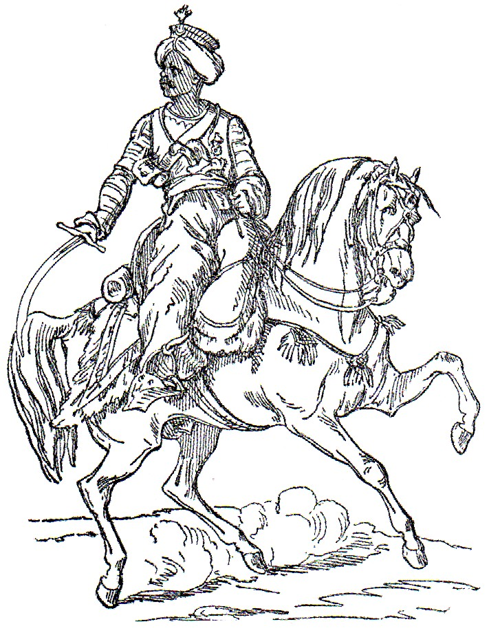 Mamelucco a cavallo della Vecchia Guardia